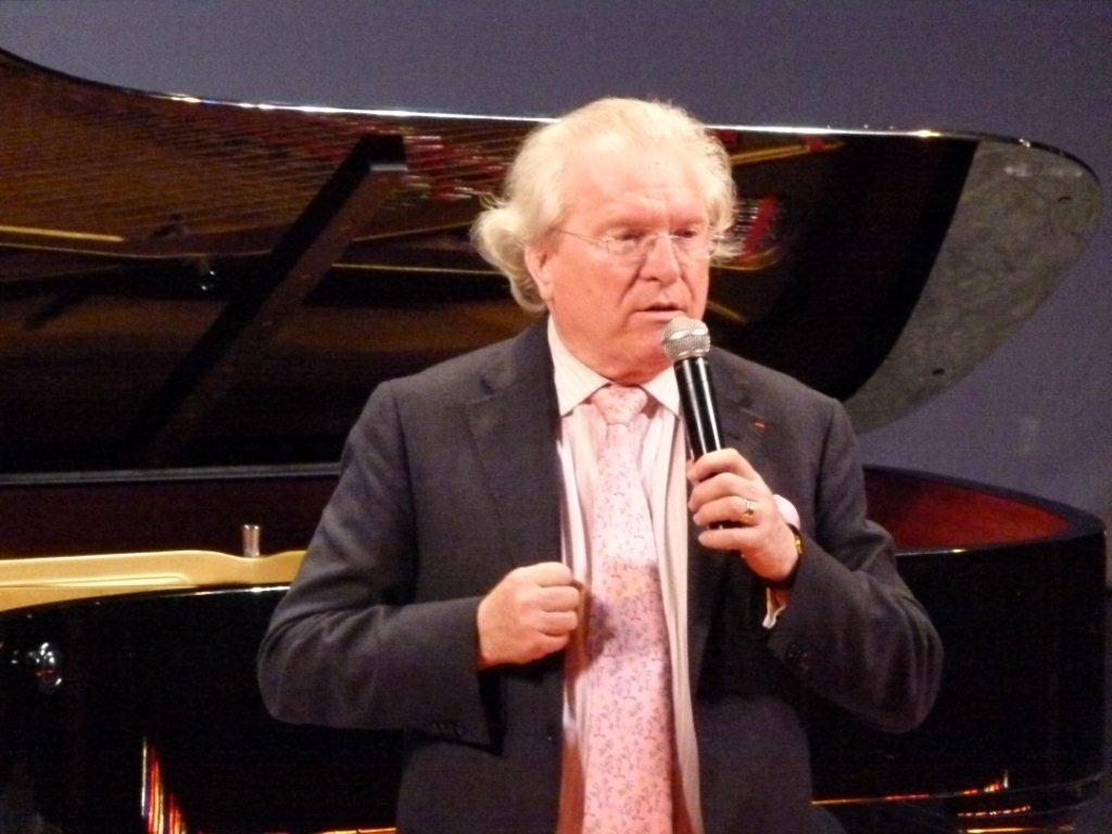 Le journaliste et musicologue Alain Duault